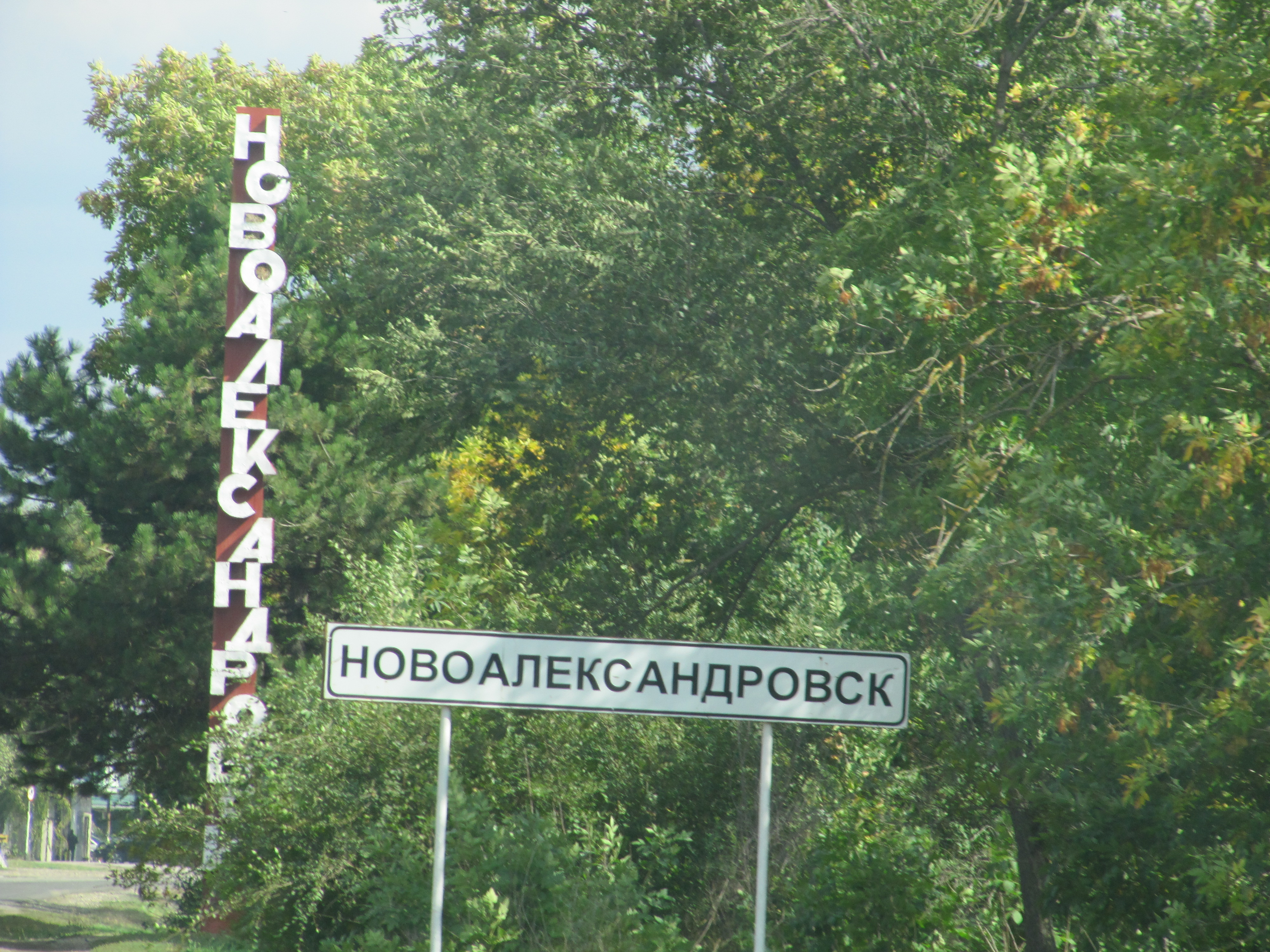 Дорожный указатель, город Новоалександровск, Ставропольский край, Россия